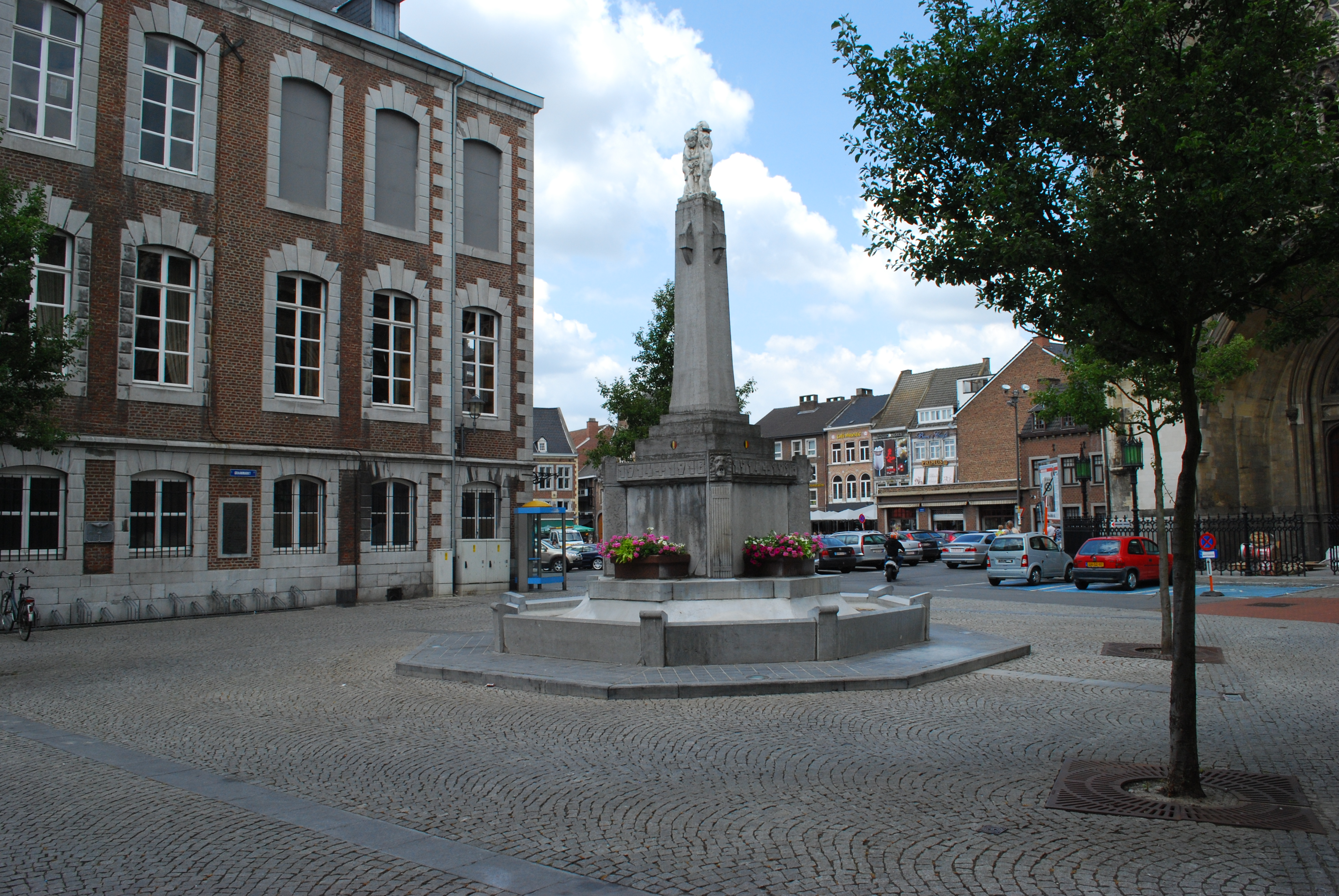 Tongres : monument commémoratif des deux guerres mondiales sur Graanmarkt.